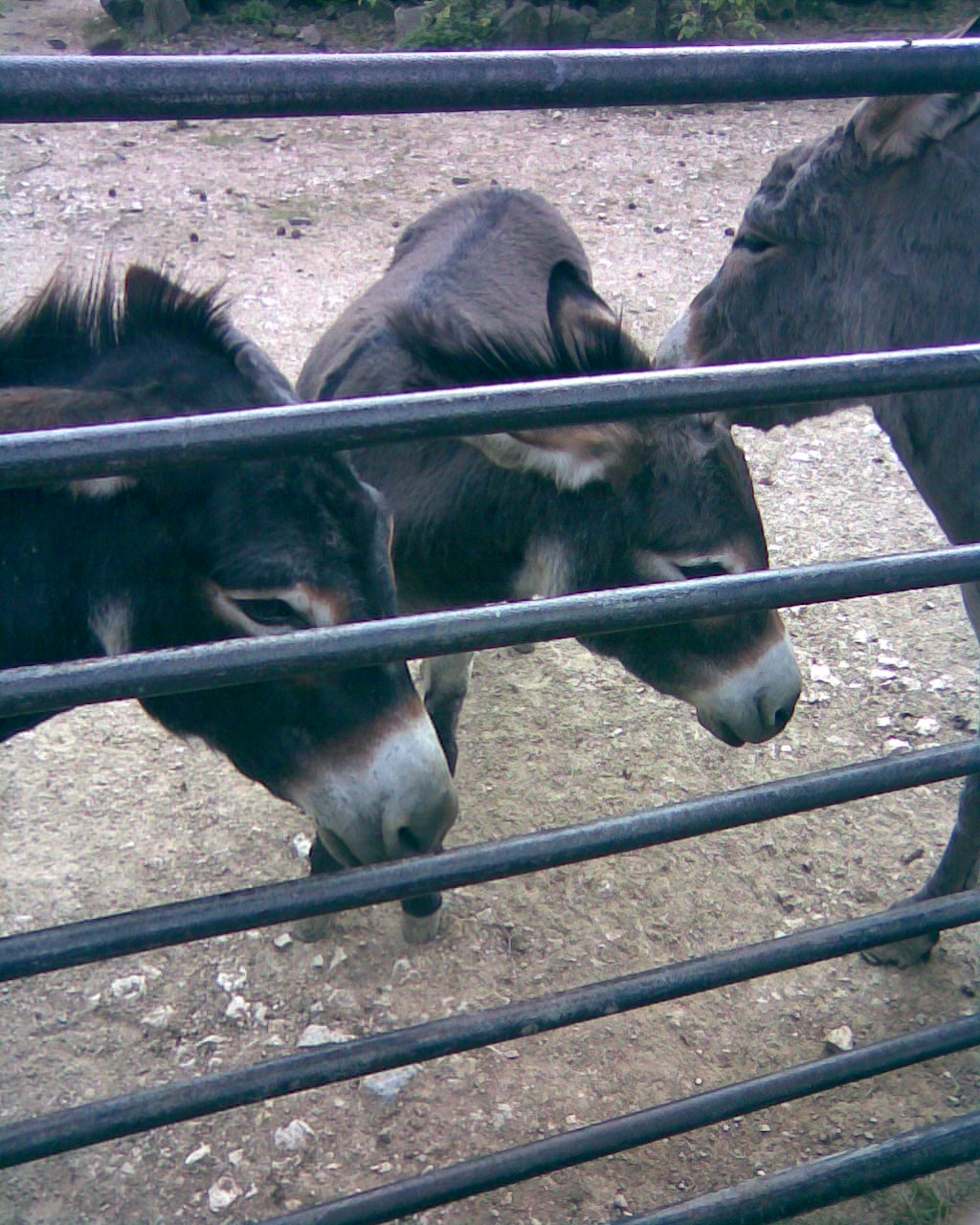 jackass